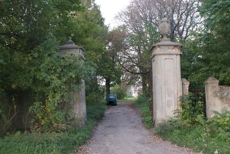 Węgierskie 10-11 - zespół pałacowy: brama do pałacu